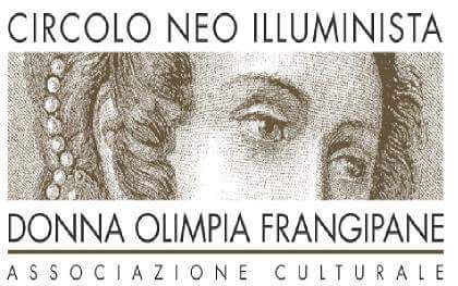 Simbolo dell'associazione culturale Circolo Neo Illuminista 'Donna Olimpia Frangipane'